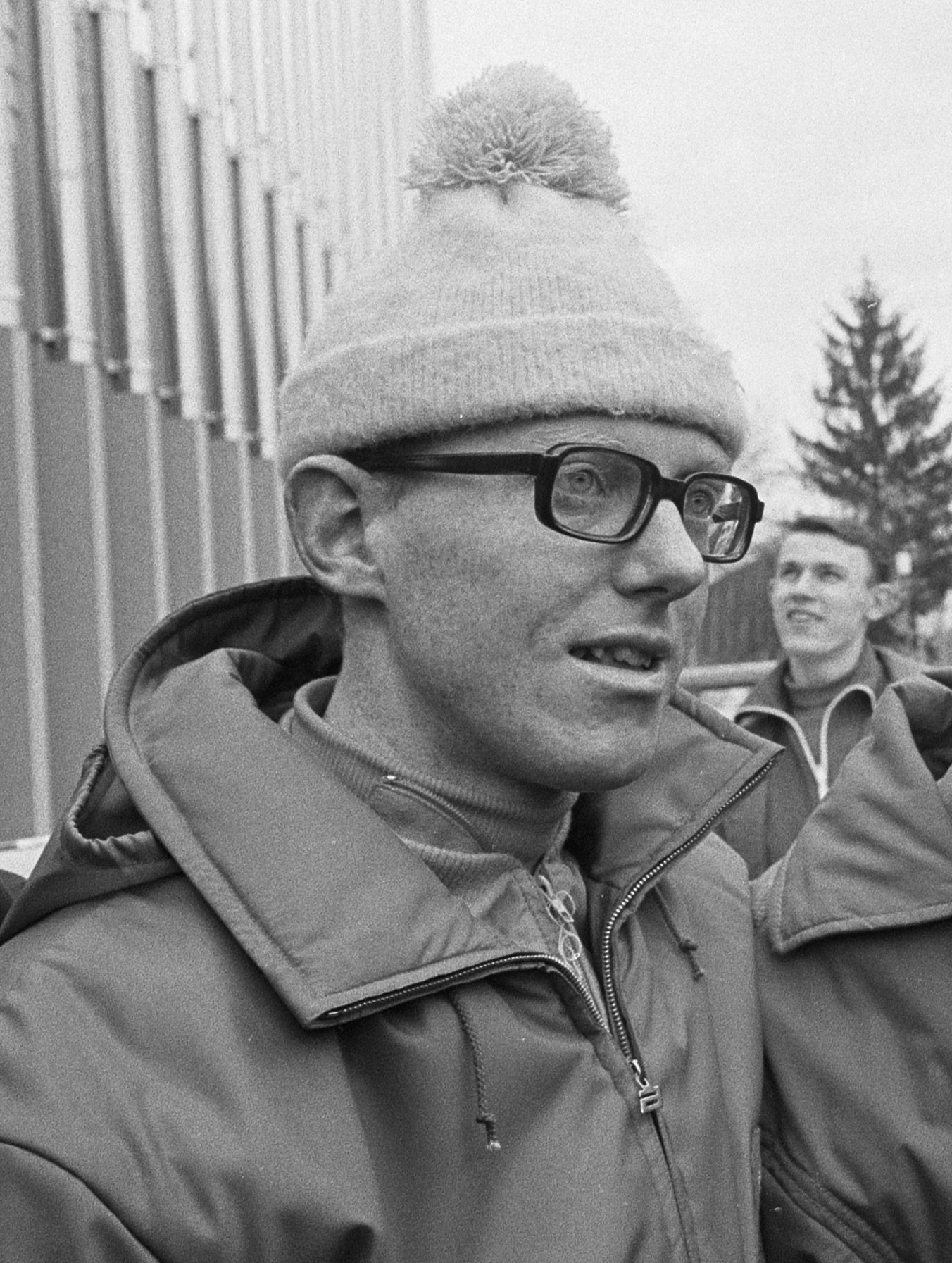 Peter Nottet